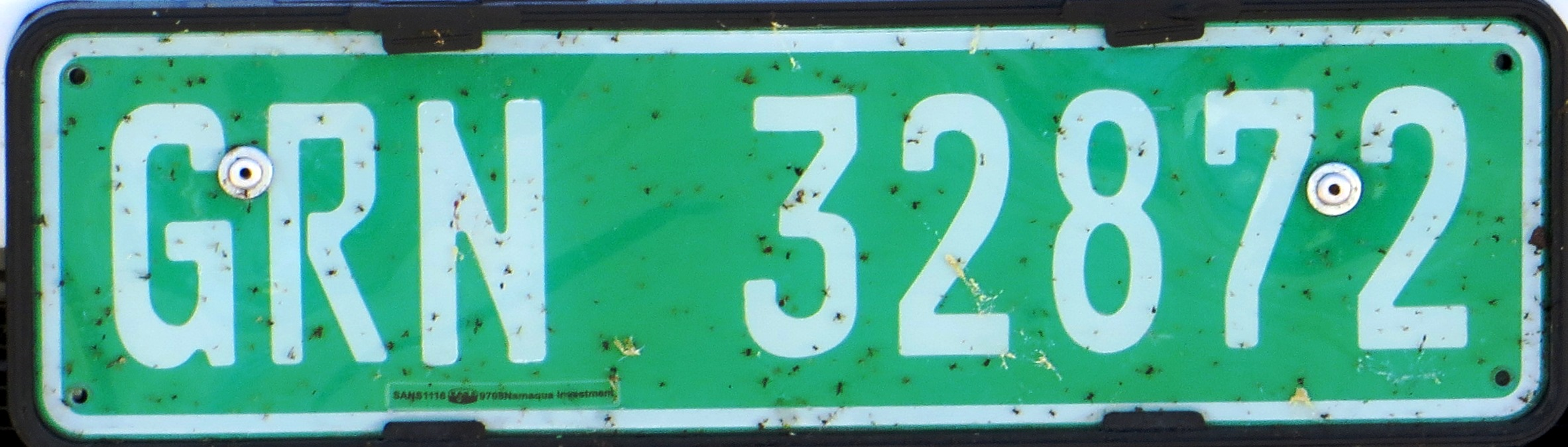 Overheids kentekenplaat Namibië